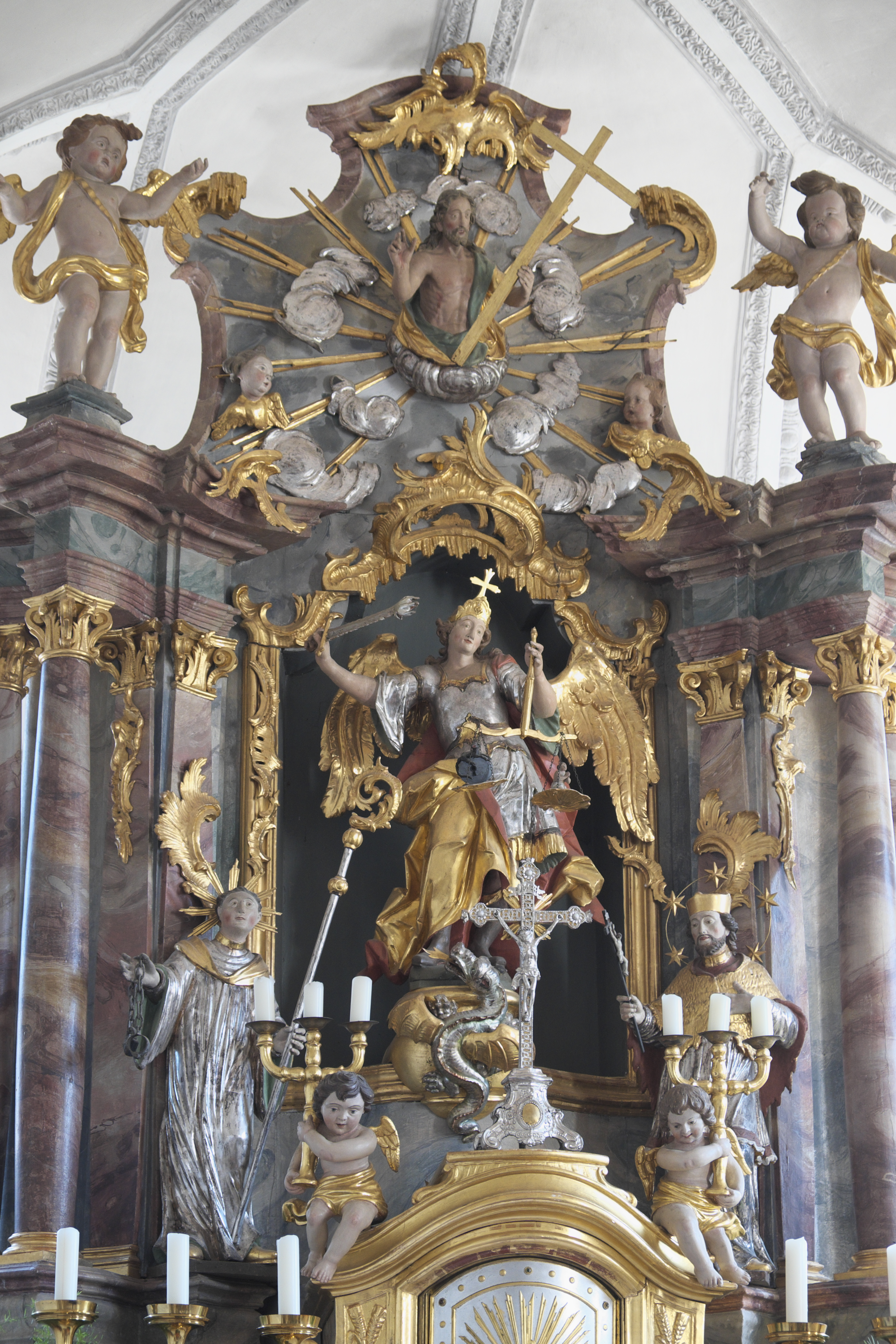 Katholische Pfarrkirche St. Michael in Wenigmünchen (Egenhofen) im oberbayerischen Landkreis Fürstenfeldbruck (Bayern/Deutschland), Rokoko-Hochaltar mit Erzengel Michael (Mitte), dem heiligen Leonhard (links) und Johannes Nepomuk (rechts)